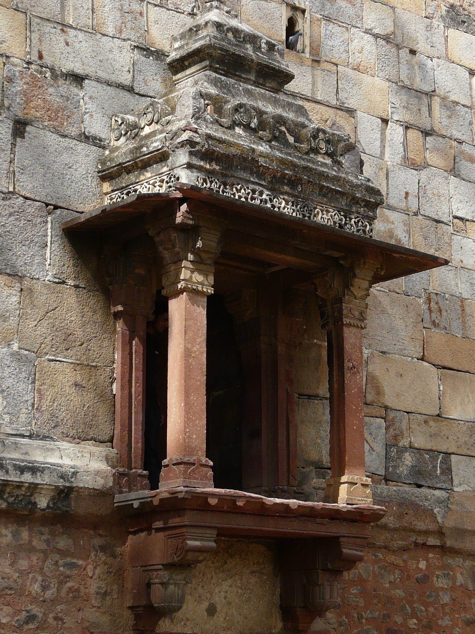 Side balcony of Bada Gumbad mosque Bara Gumbad, Lodhi Garden, Delhi